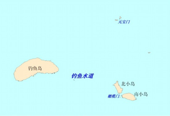 钓鱼水道地形图